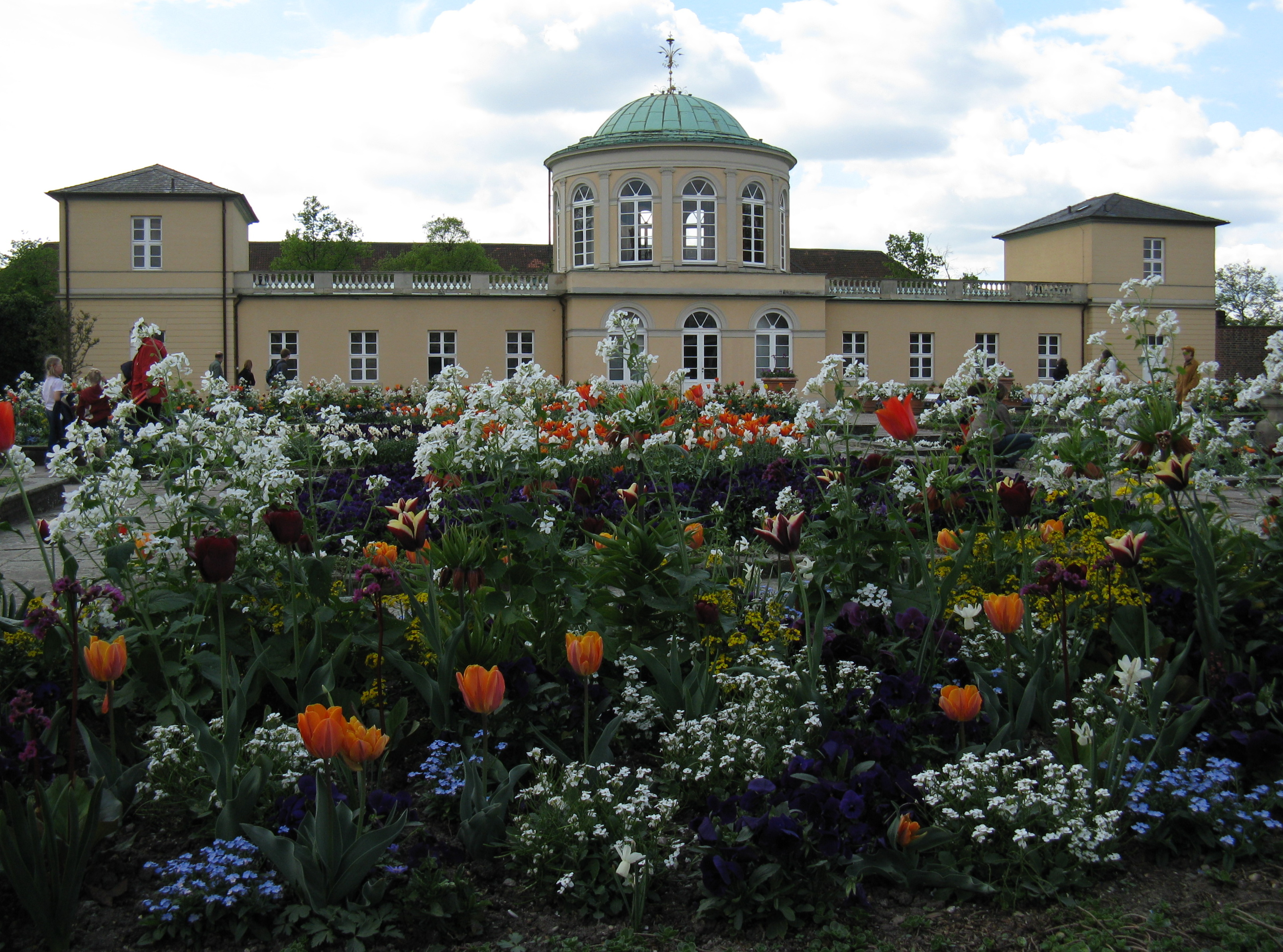 Bibliothekspavillon in Hannover-Herrenhausen, Gartenseite